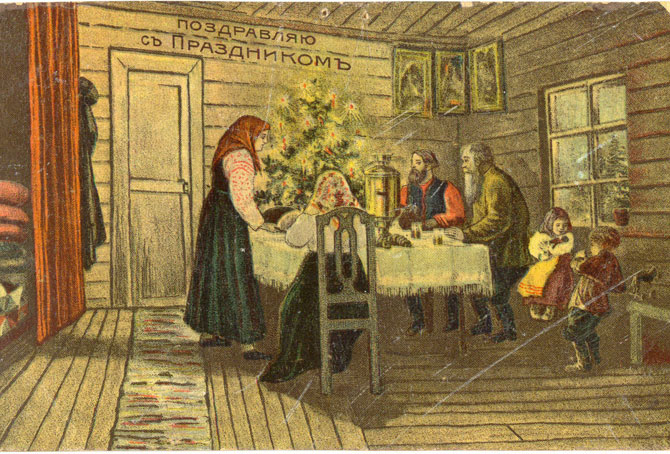 Новогодняя дореволюционная открытка. Россия.